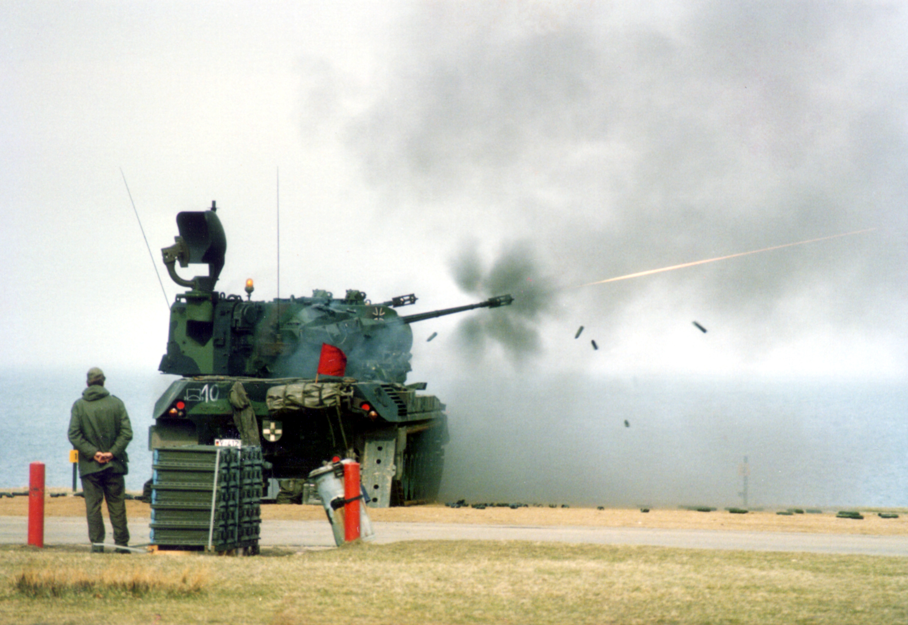 FLAK-Panzer-Gepard bei Flugzielschießen in der Hohwachter Bucht. Sonstiges: ...